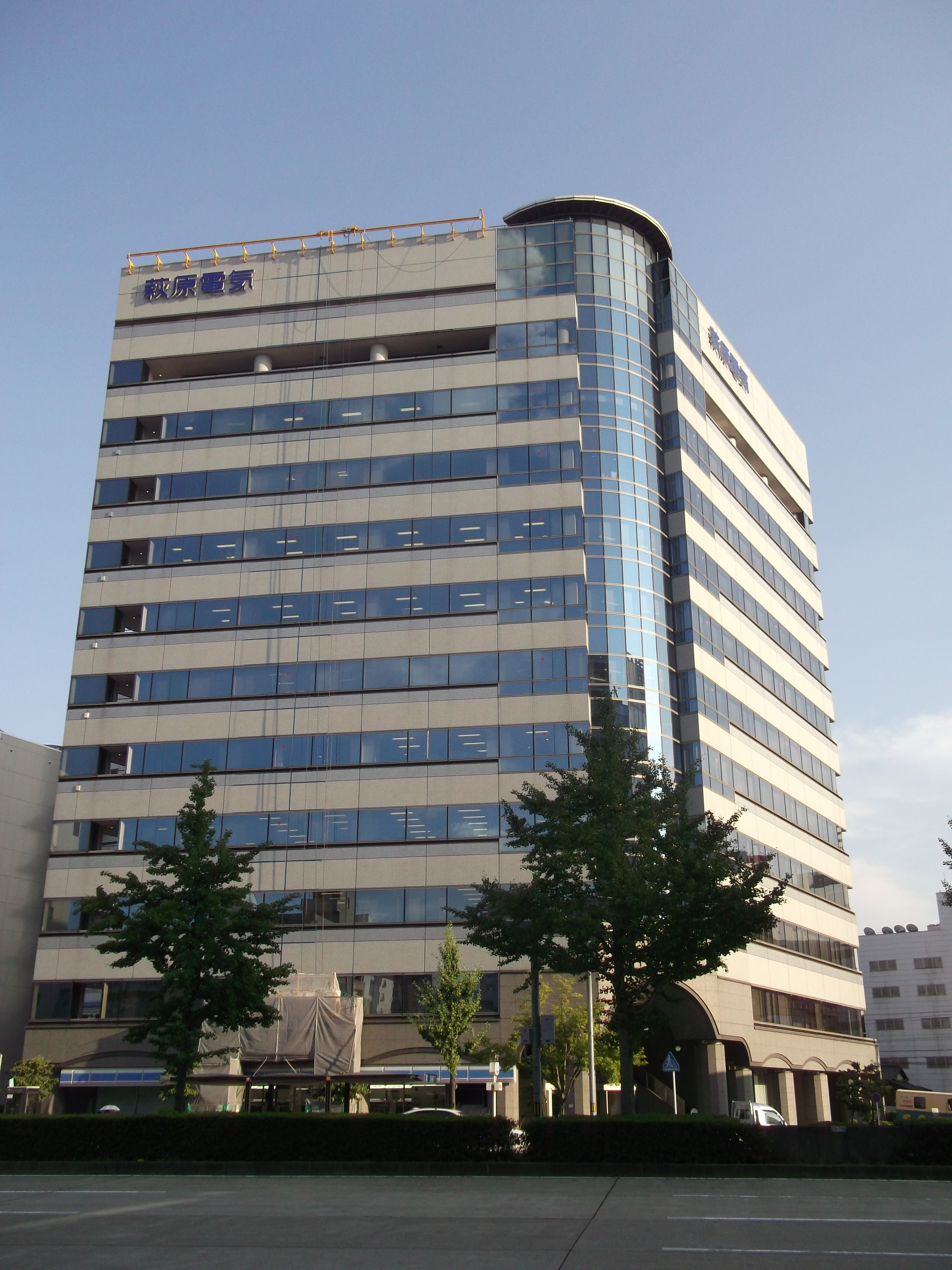 名古屋市東区の萩原電気本社を北側公道より撮影